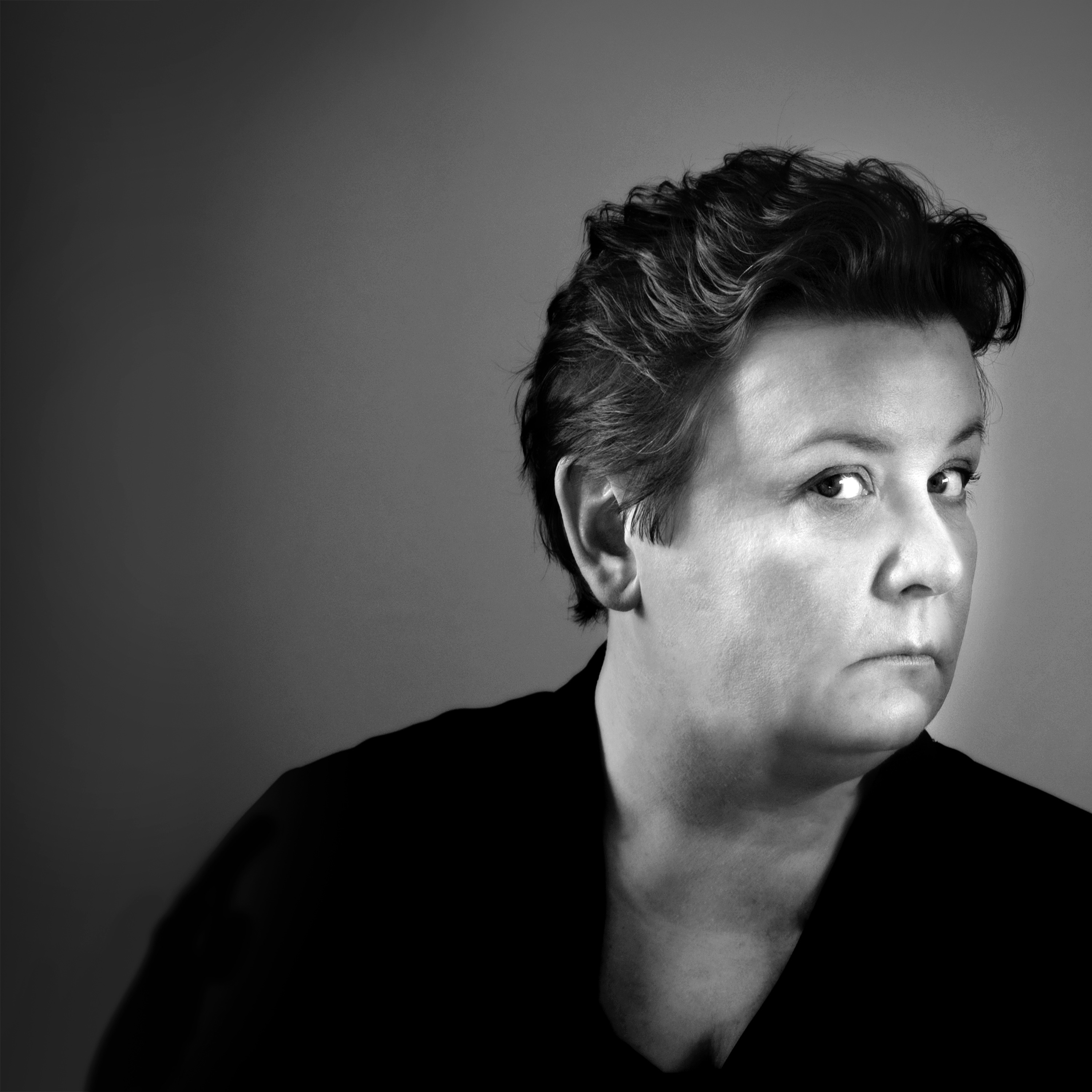 Mikko Ijäksen valokuva Maija Kaunismaan levyä The Pine House Songs varten